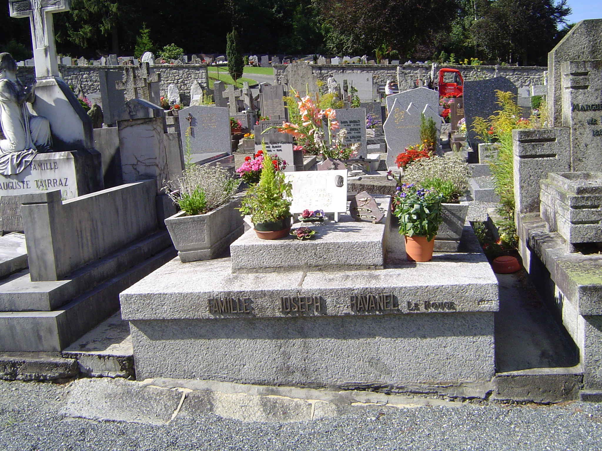 Photo prise au cimetière de Chamonix-Mont-Blanc (France)